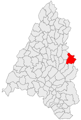 Categorie:Hărţi ale judeţului Bihor